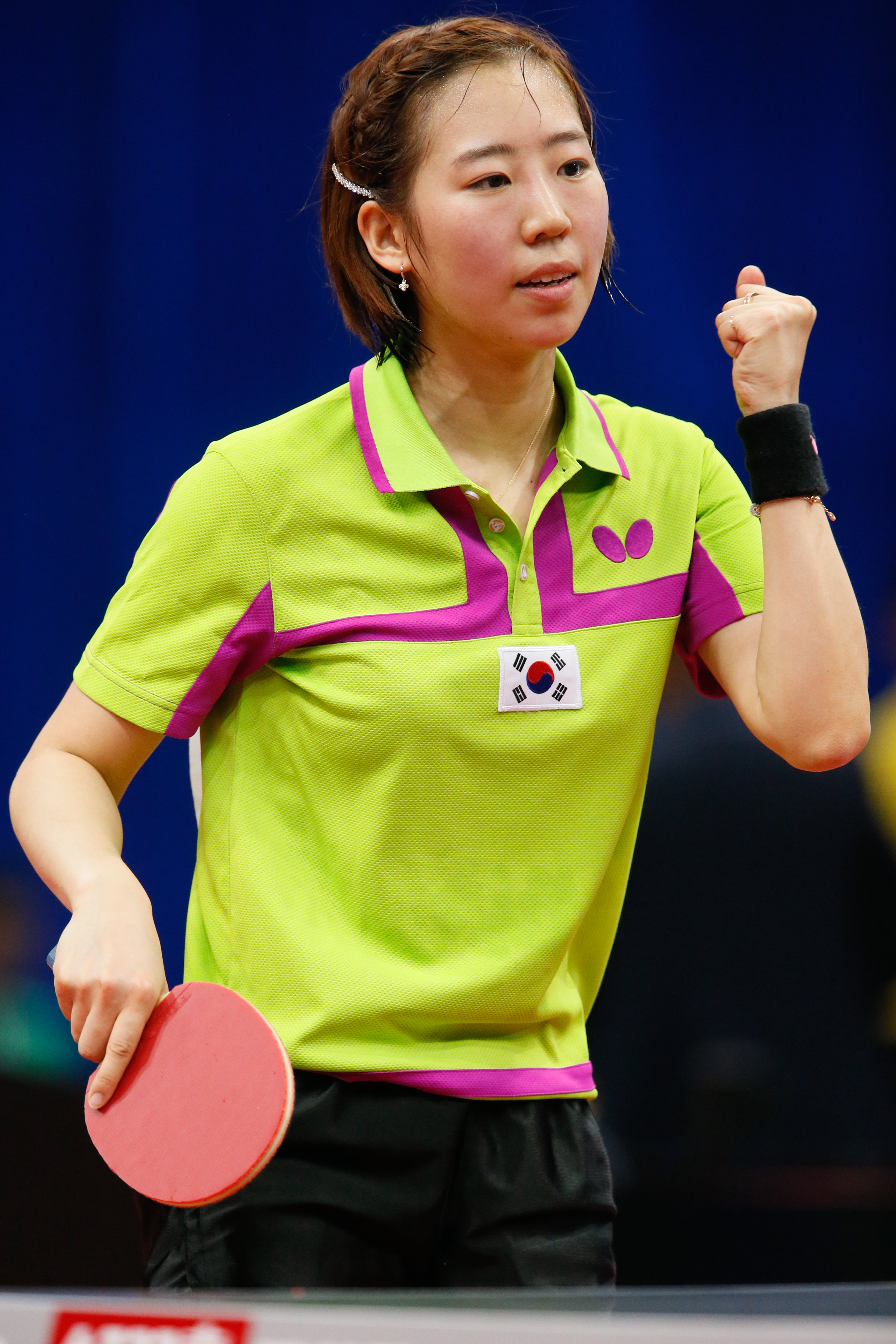 _K0K9545